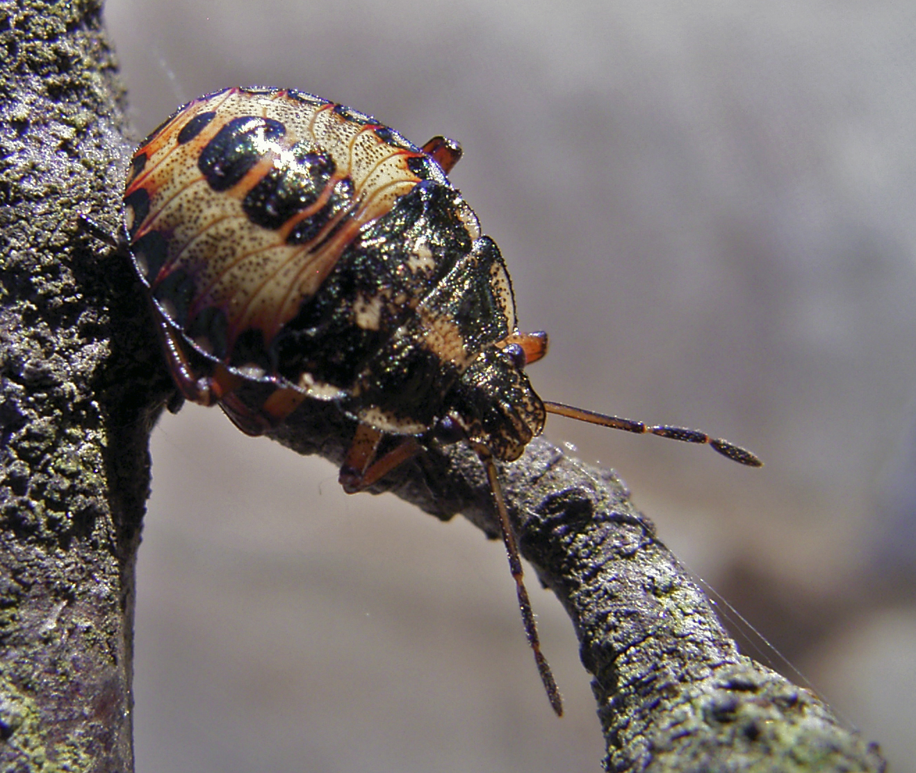 Waldwächter (Arma custos), 4. Larvenstadium, NSG Fintlandsmoor (Niedersachsen)